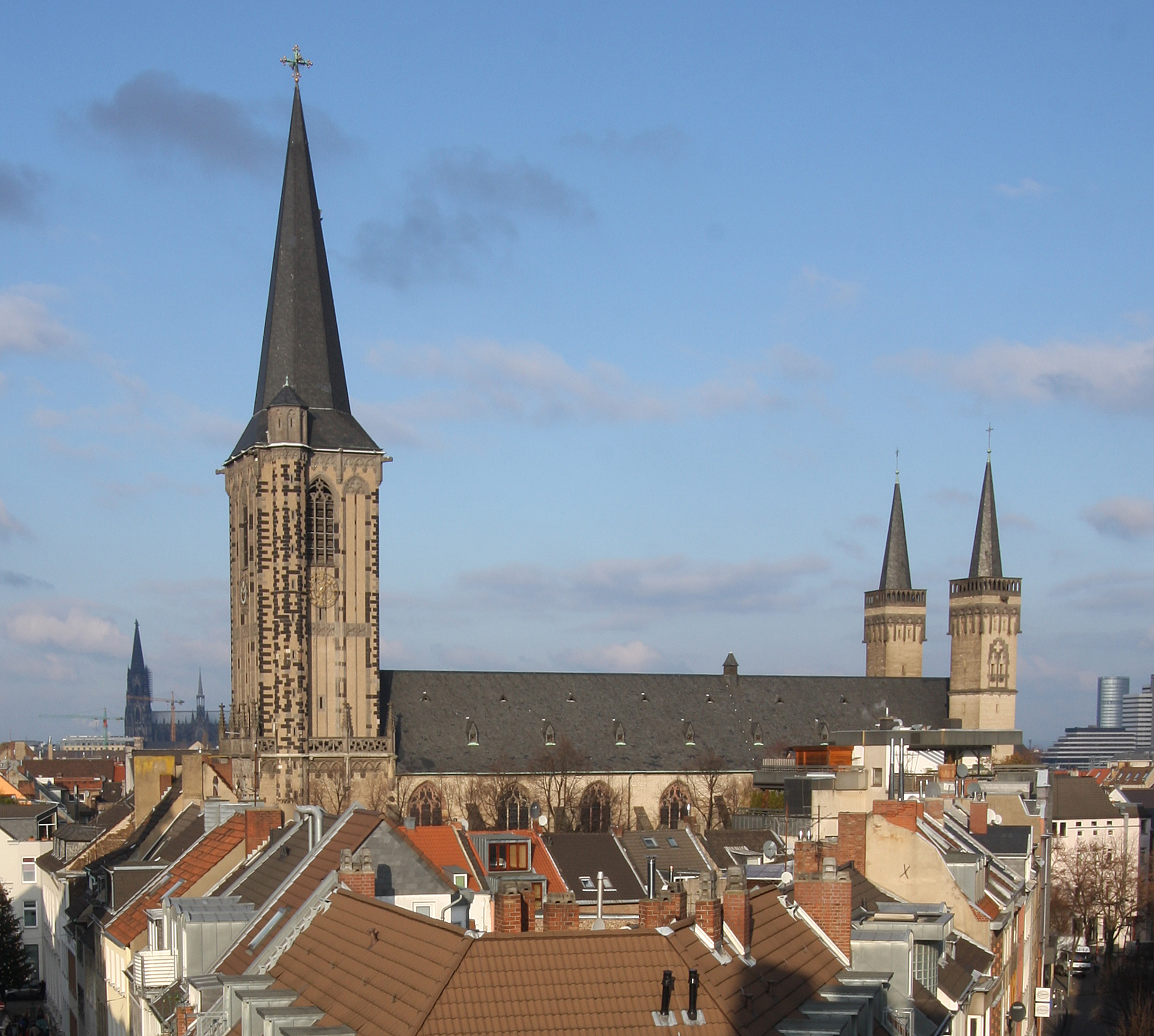 Severinskirche in Köln von Süden aus gesehen (Blick aus der Severinstorburg)